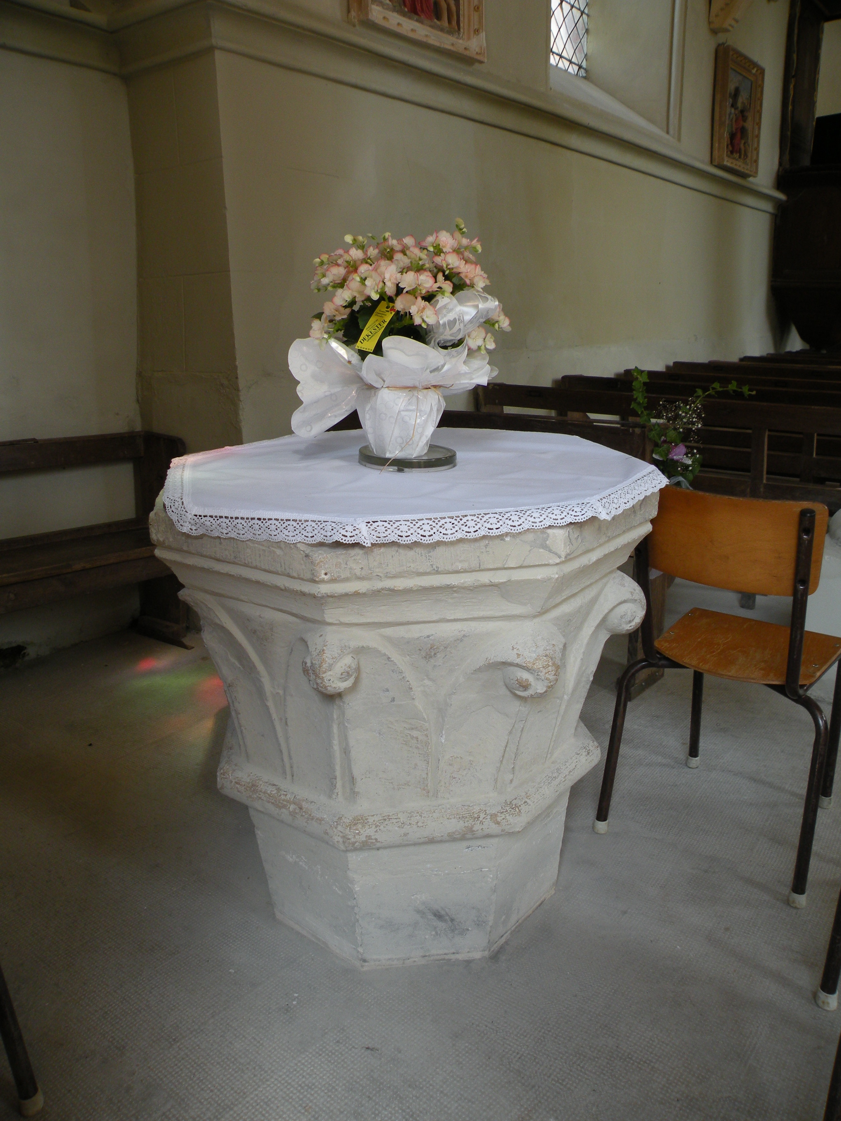 Église Saint-Sulpice de Roy-Boissy fond baptismal